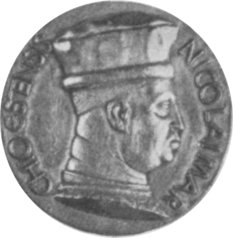 Medaglia di Niccolò III d'este, 6,1 cm, recto